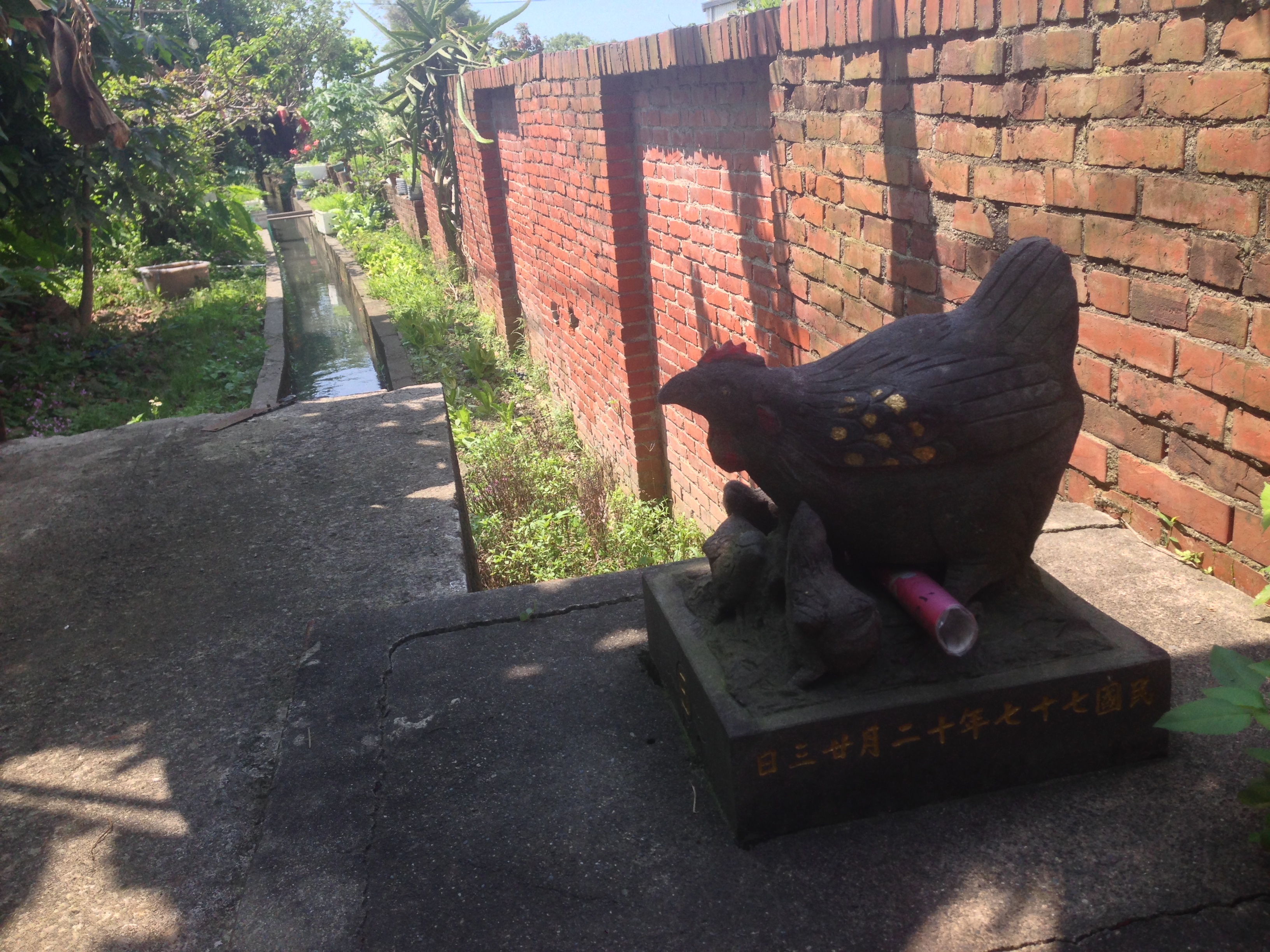 中文（台灣）: 水源金雞母近照